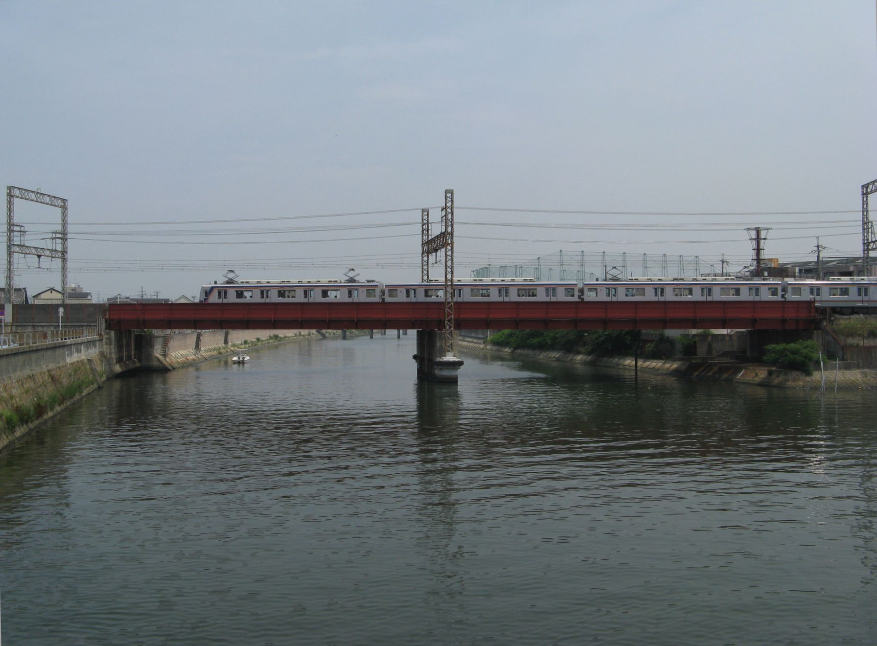 石津川を渡る南海本線の列車 石津川橋から東望